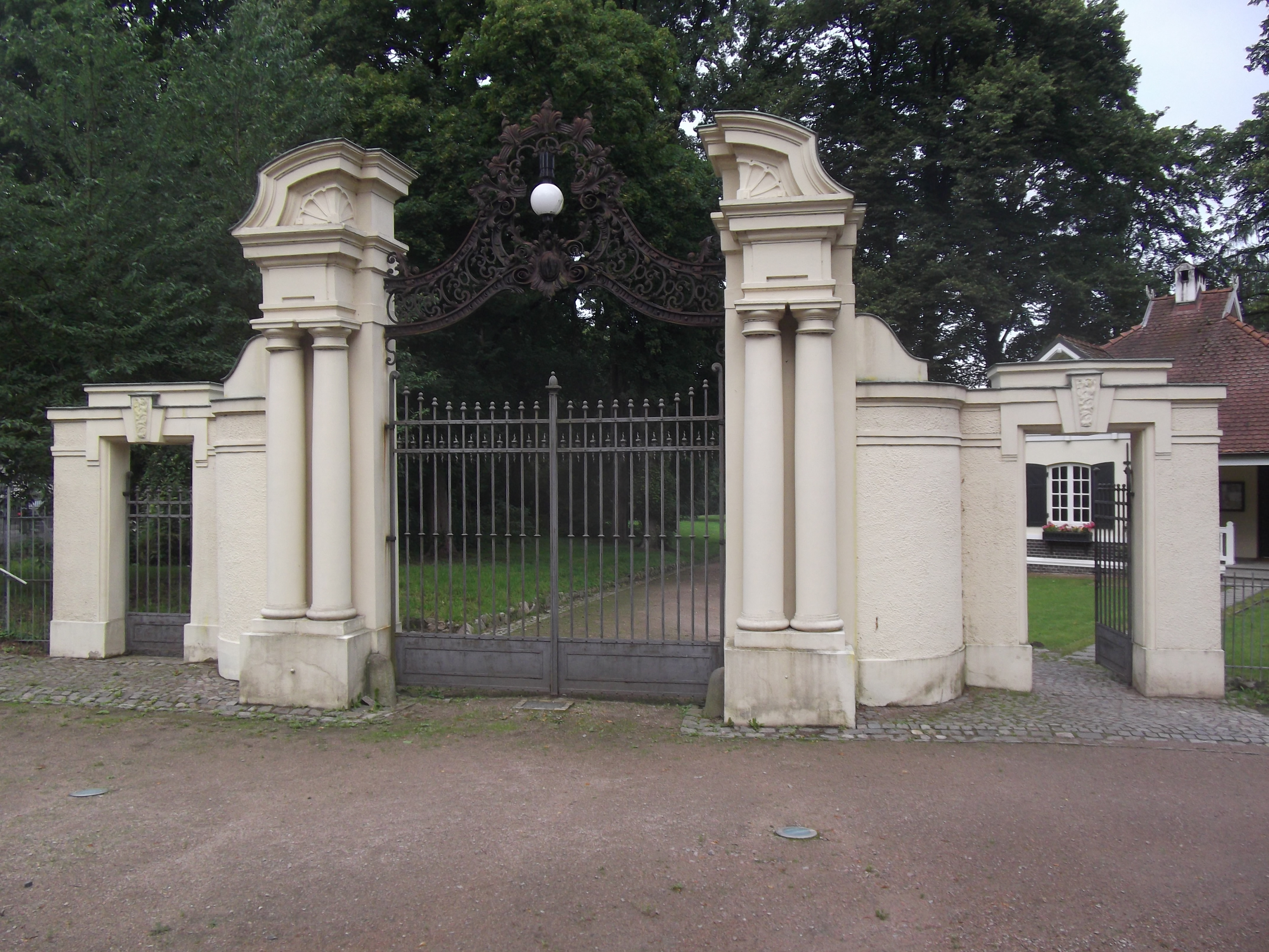 Hamburg, August 2015